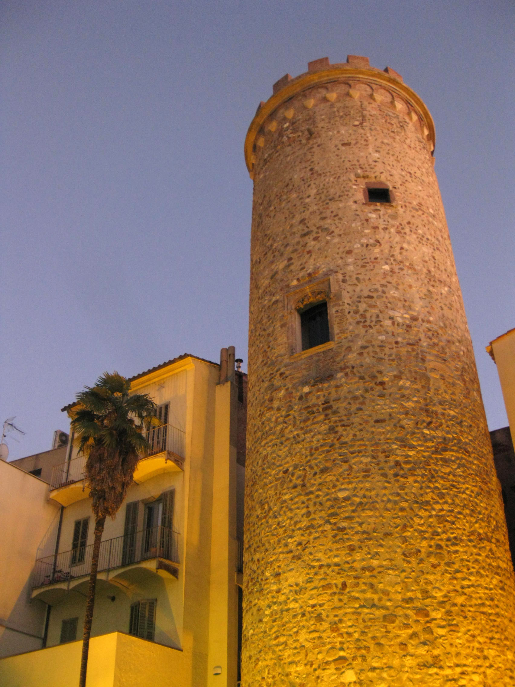 Casa Badia, abans Casa J. Beltran (Terrassa) Object location41° 33′ 44.05″ N, 2° 00′ 39.62″ E